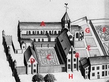 Plan commenté de l'abbaye Notre-Dame d'Argenteuil